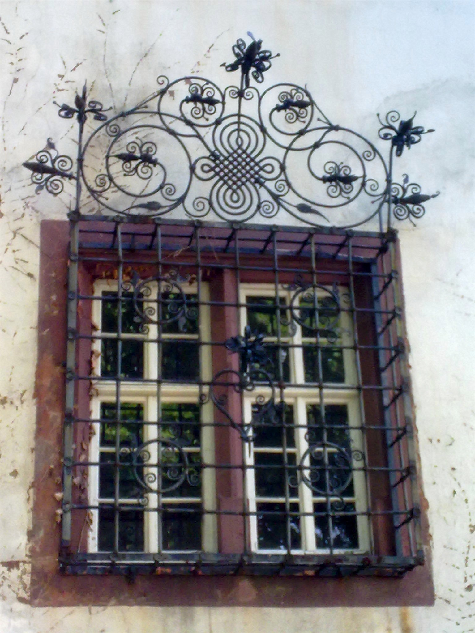 Die originalen Schmiedearbeiten an den Fenstern des Wambolt'schen Schlosses in Groß-Umstadt